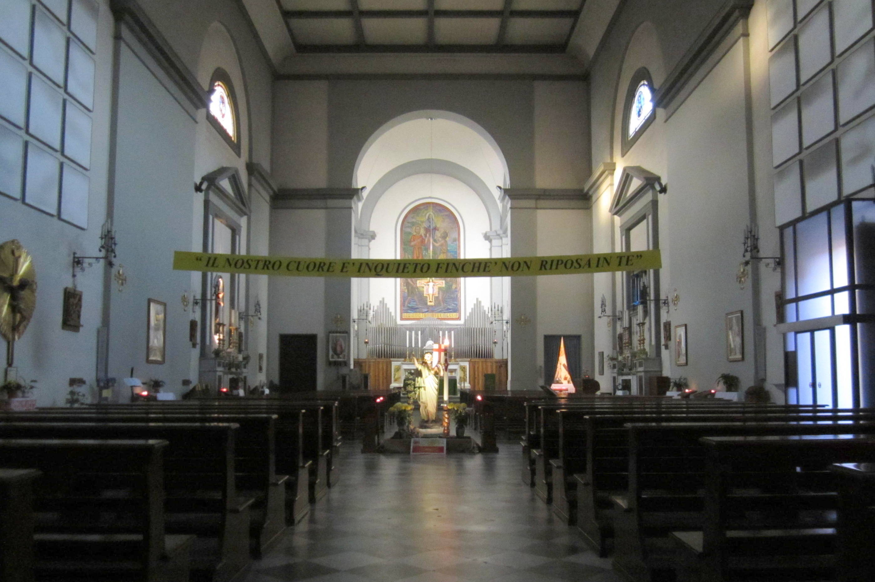 Interno della Chiesa di Sant'Andrea (Livorno)